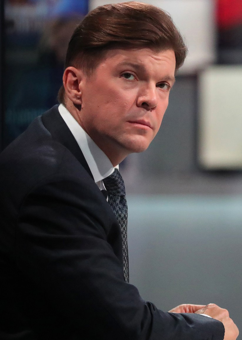 Кирилл Клеймёнов во время Прямой линии с Владимиром Путиным